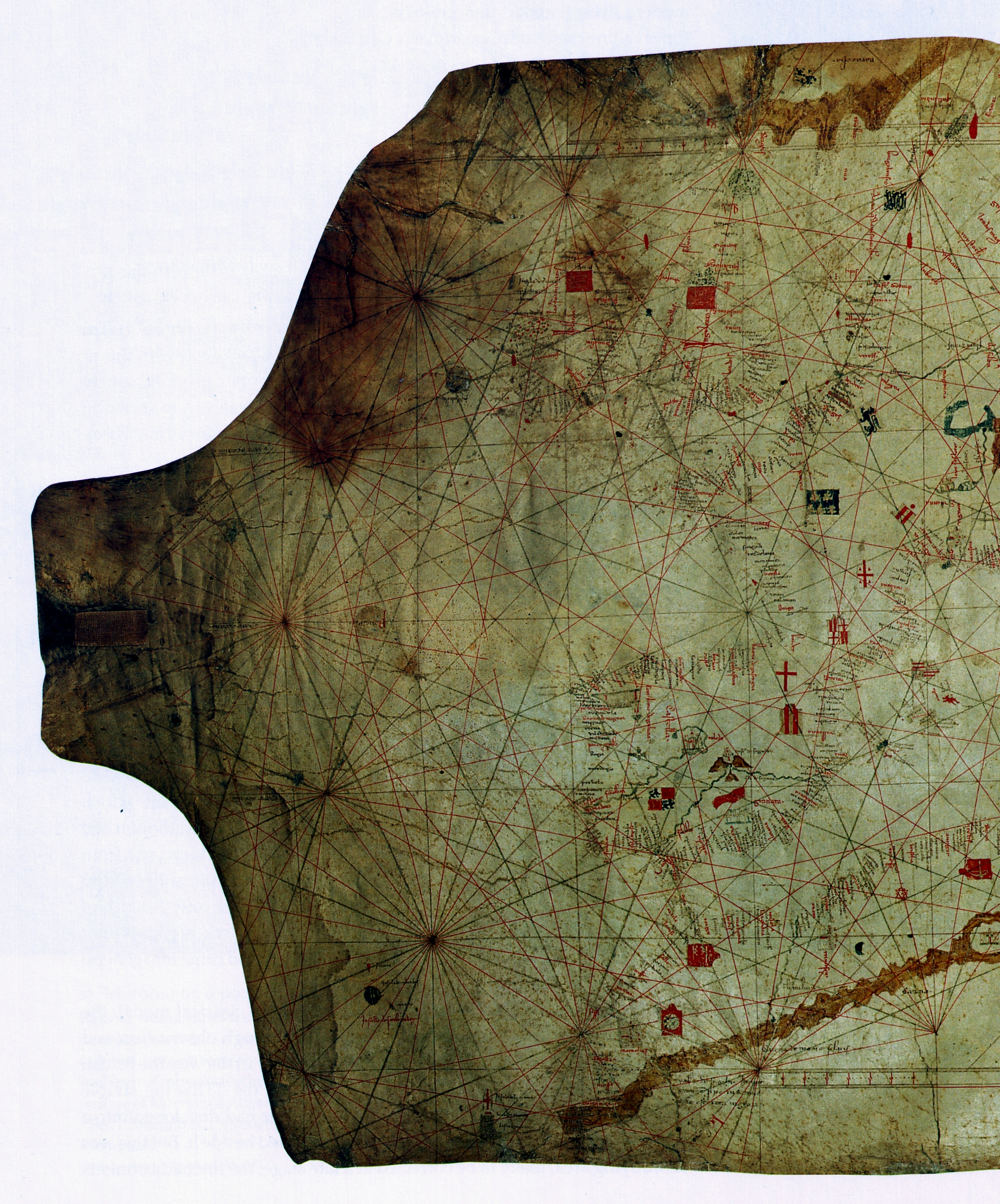 Portolan chart, attrib. Angelino Dulcert